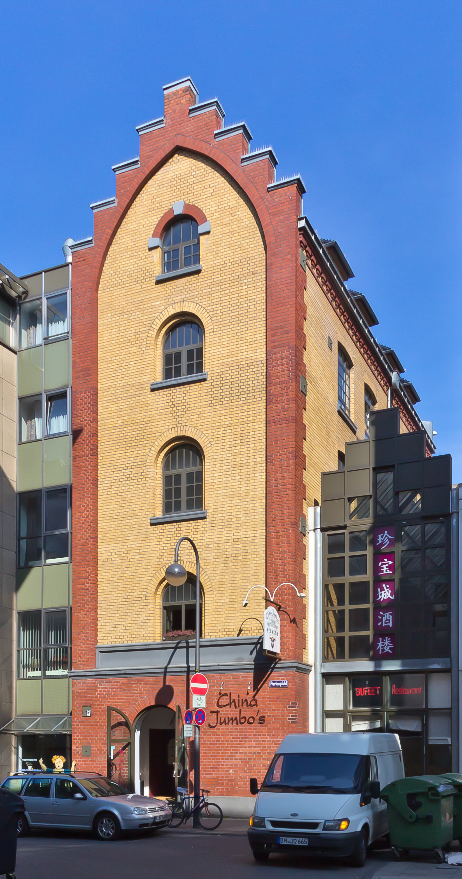 Denkmalgeschütztes Fabrikgebäude der Richmodis-Brauerei, Köln